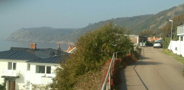 Kulabergas (Kullaberg), Švedija